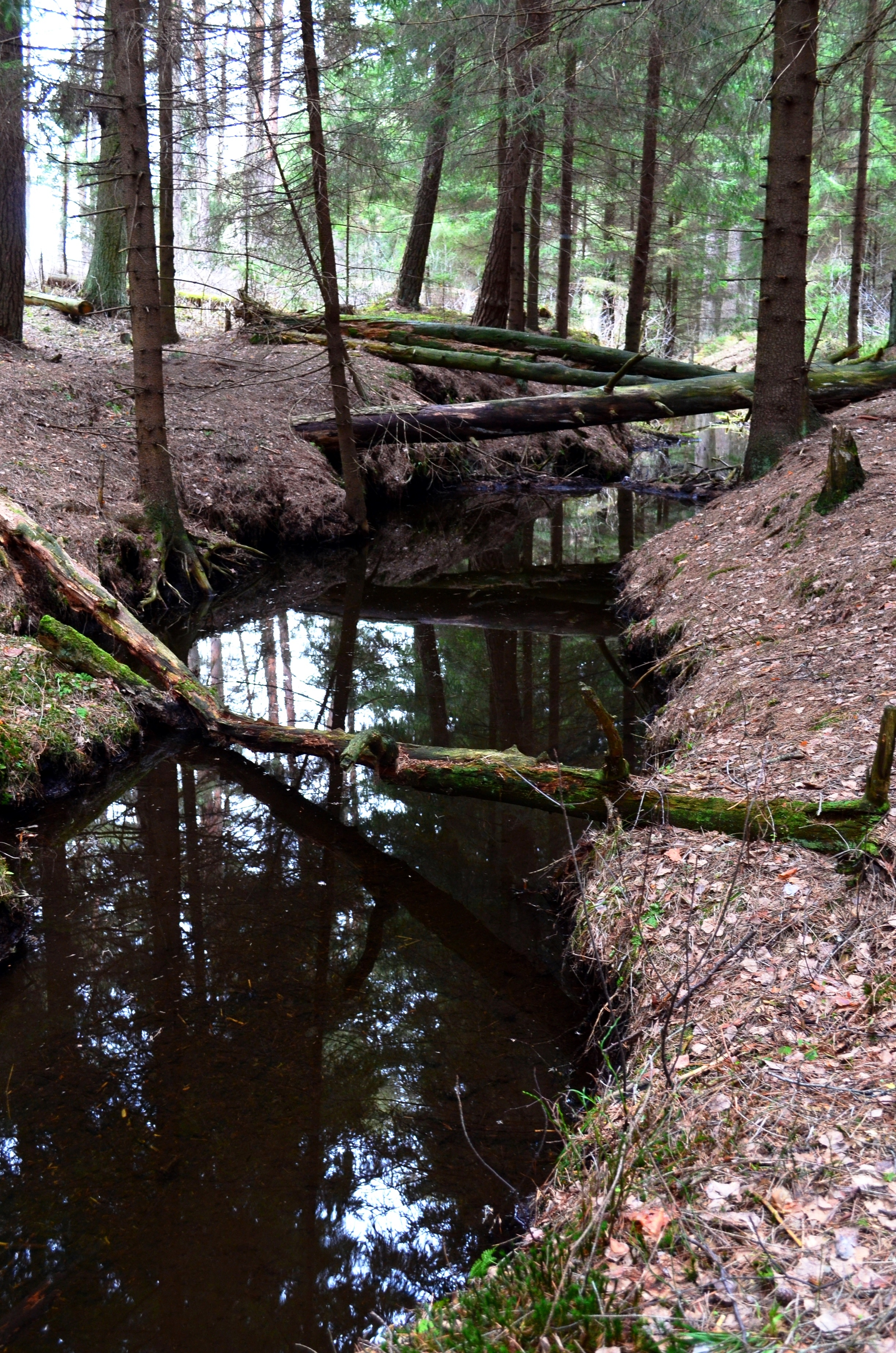 Upelis, jungiantis Juodžio ir Balžio ežerus. Vilnius